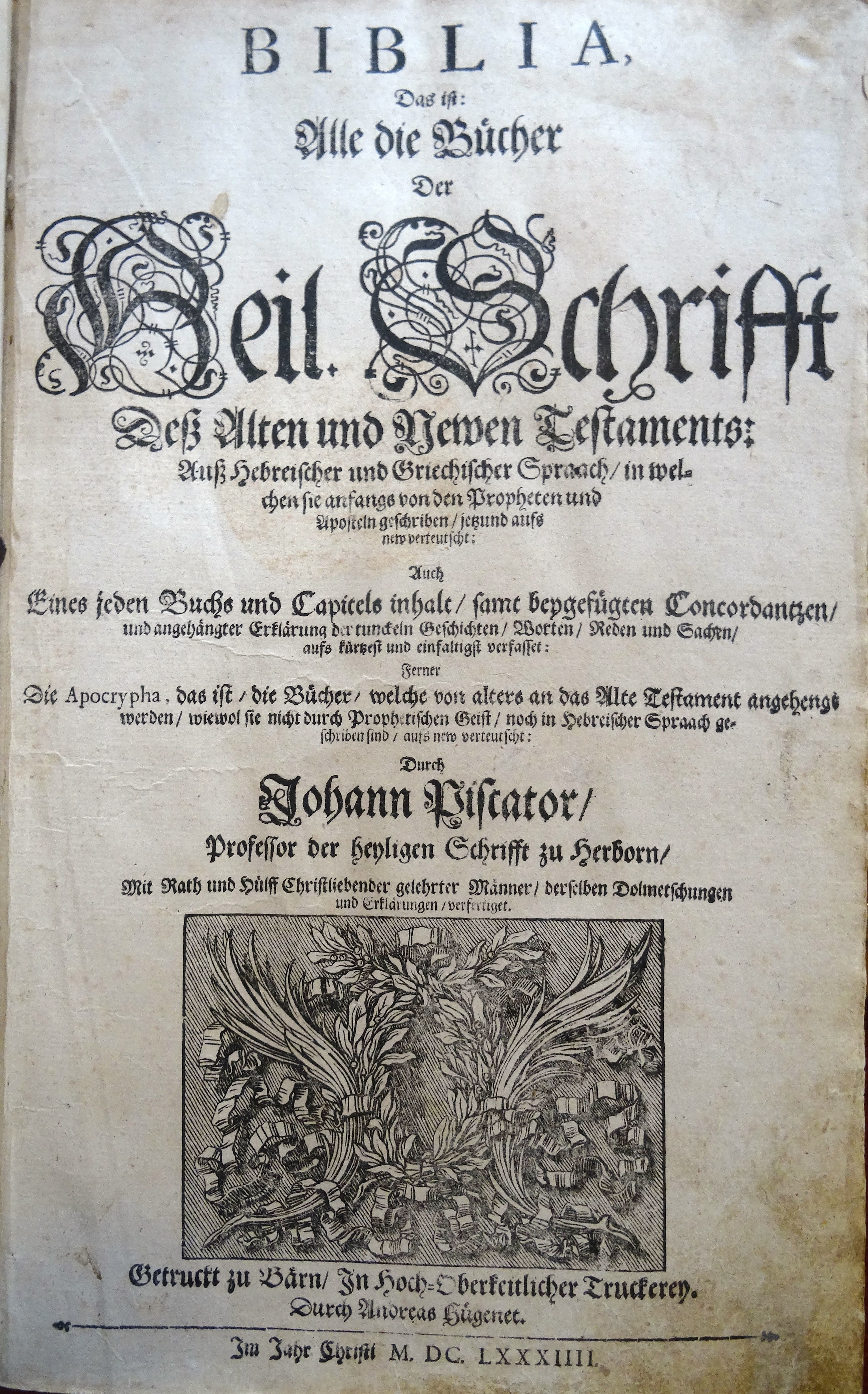 Gasterntal: Gasternbibel